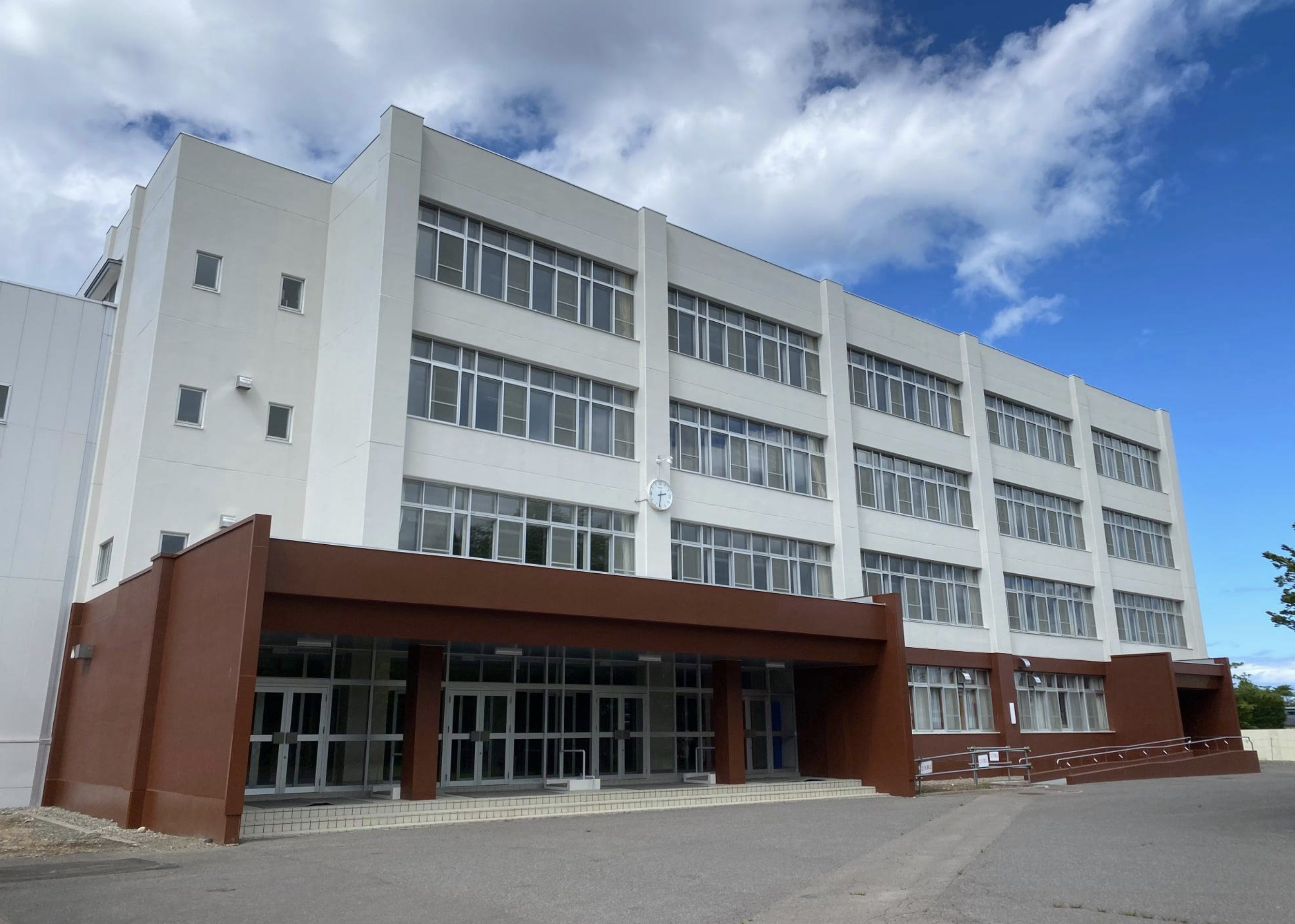 八雲高等学校の写真